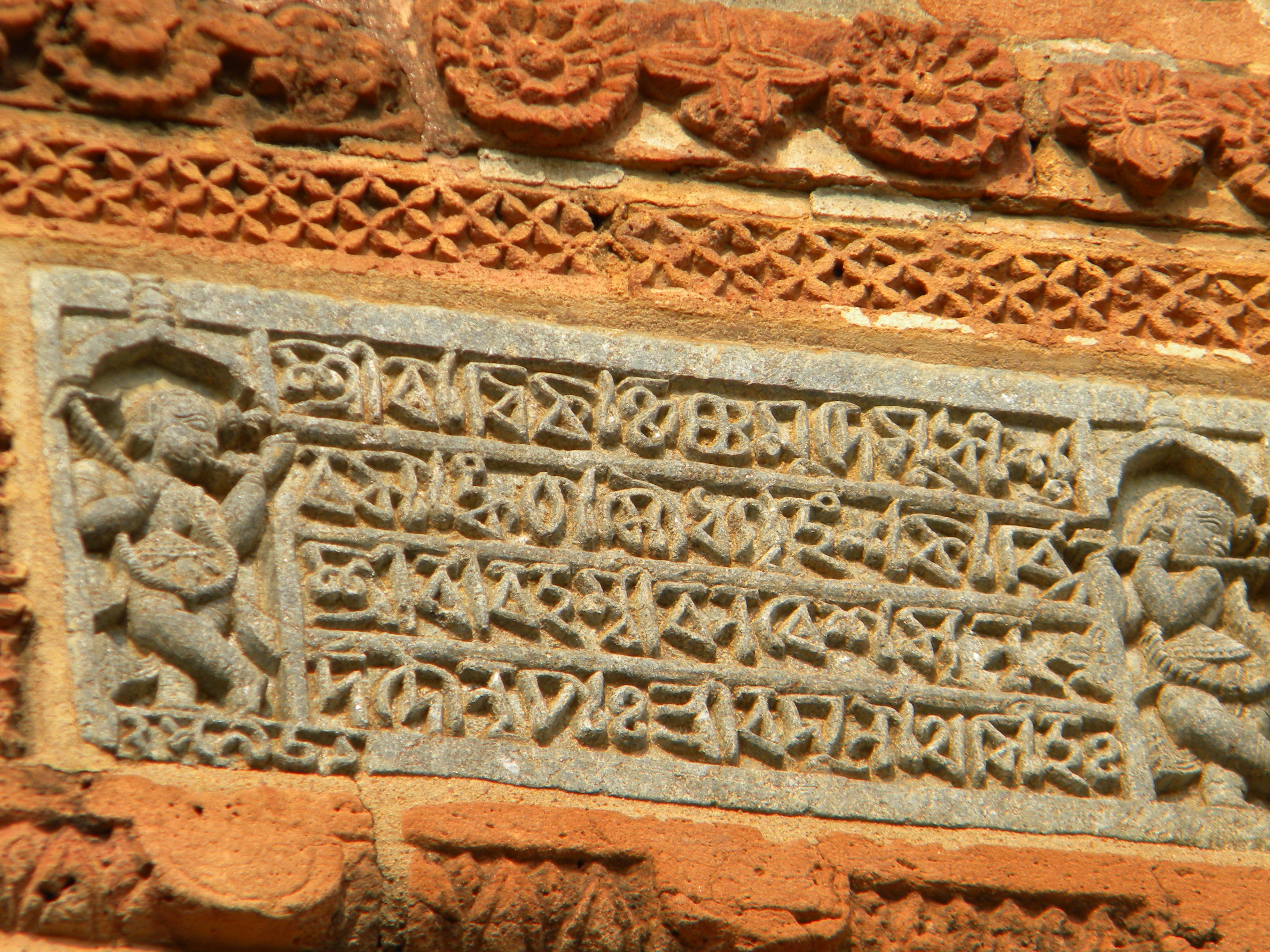 Script written on the walls of Shyamrai Temple, Bishnupur, India depicting its year of establishment on 1643 AD.